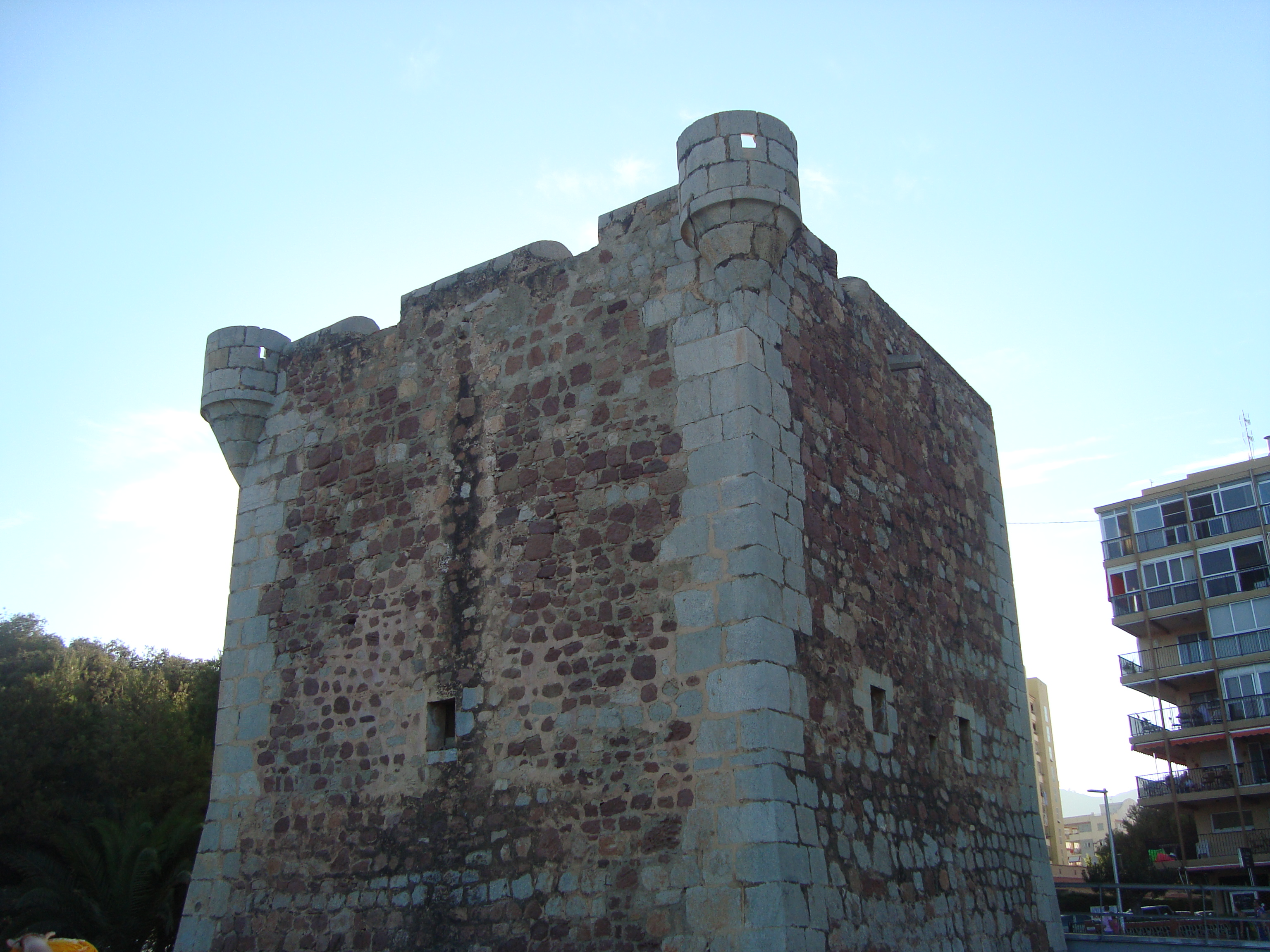 Torre de San Vicente, Benicasim/Benicàssim